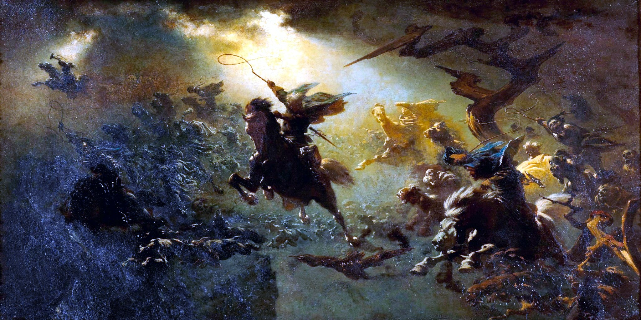 Skizze zum Gemälde